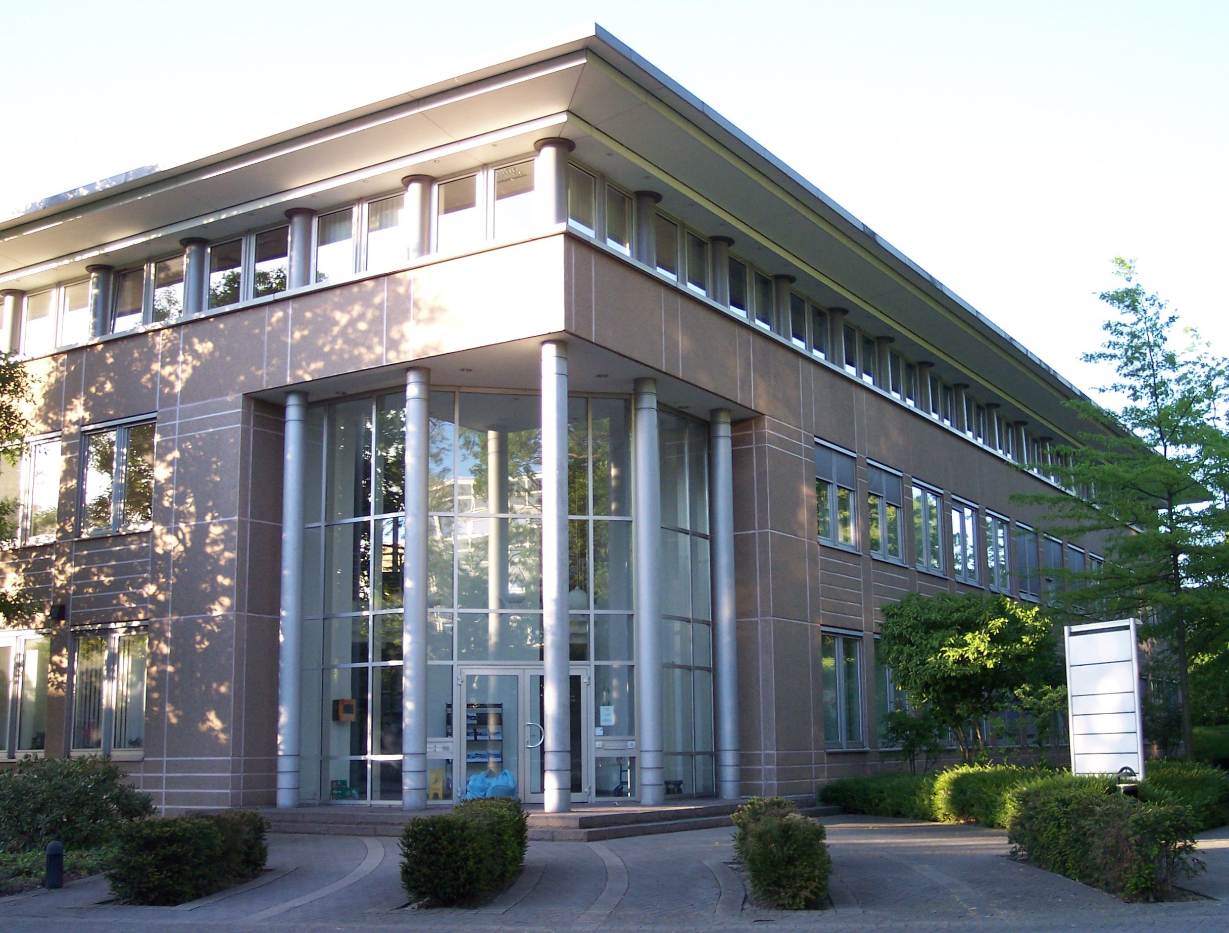 SBI Ruhr